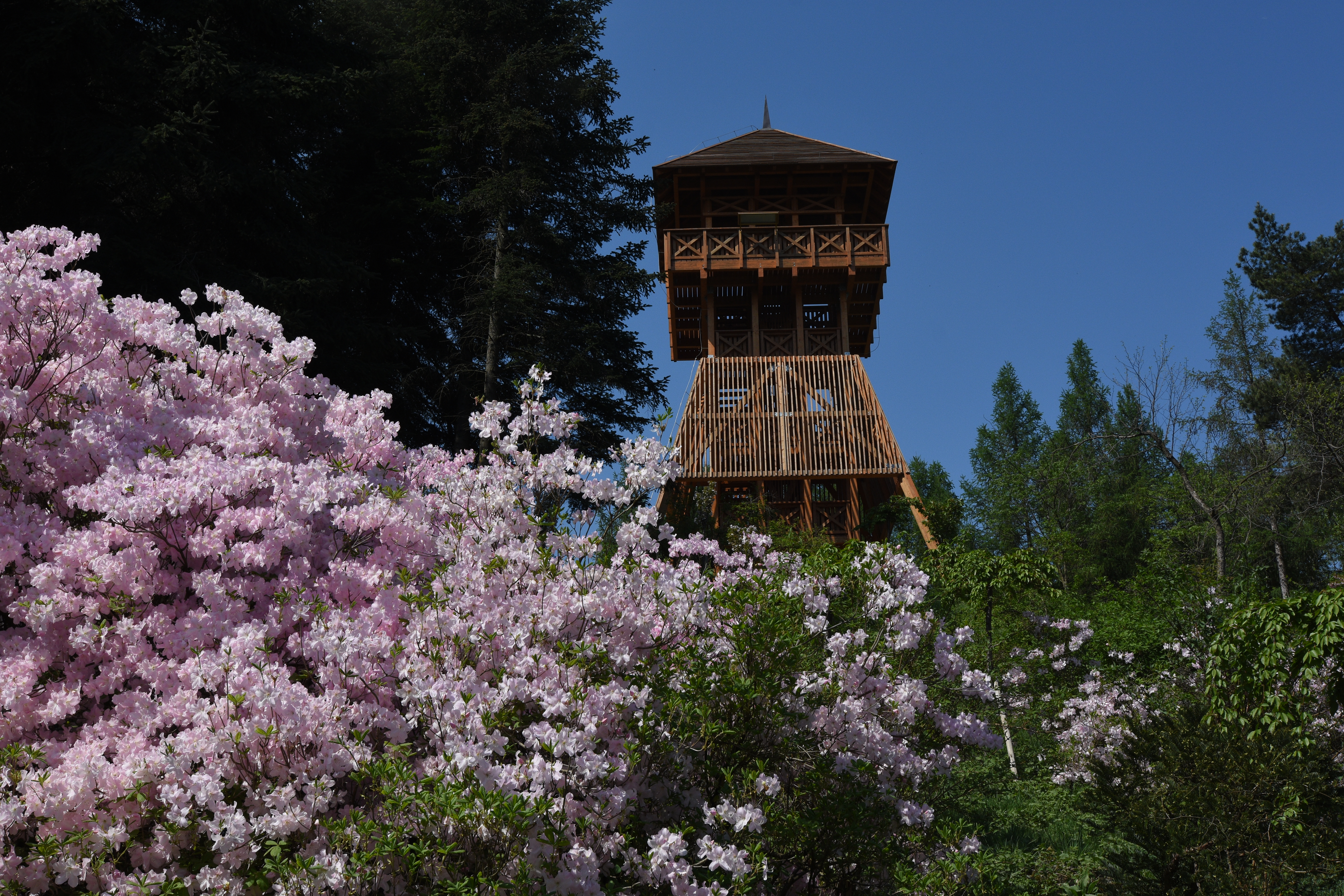 Jeli arboretum Nature Reserves arborétum természetvédelmi terület Kám